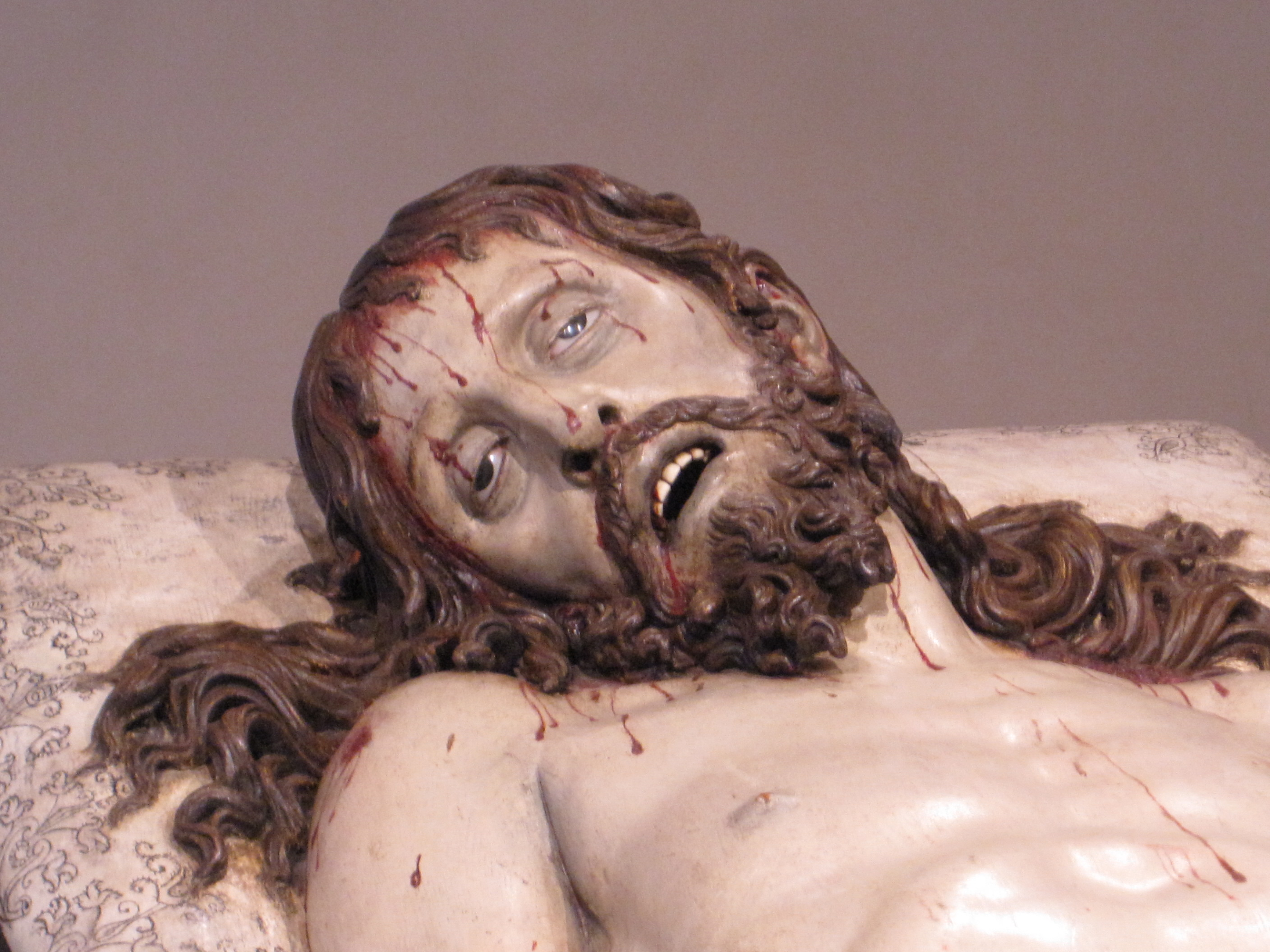 Detalle del Cristo yacente (1627), obra de Gregorio Fernández. Procede de la Iglesia de la Casa Profesa de la Compañía de Jesús en Madrid. Museo Nacional Colegio de San Gregorio (Valladolid, España).